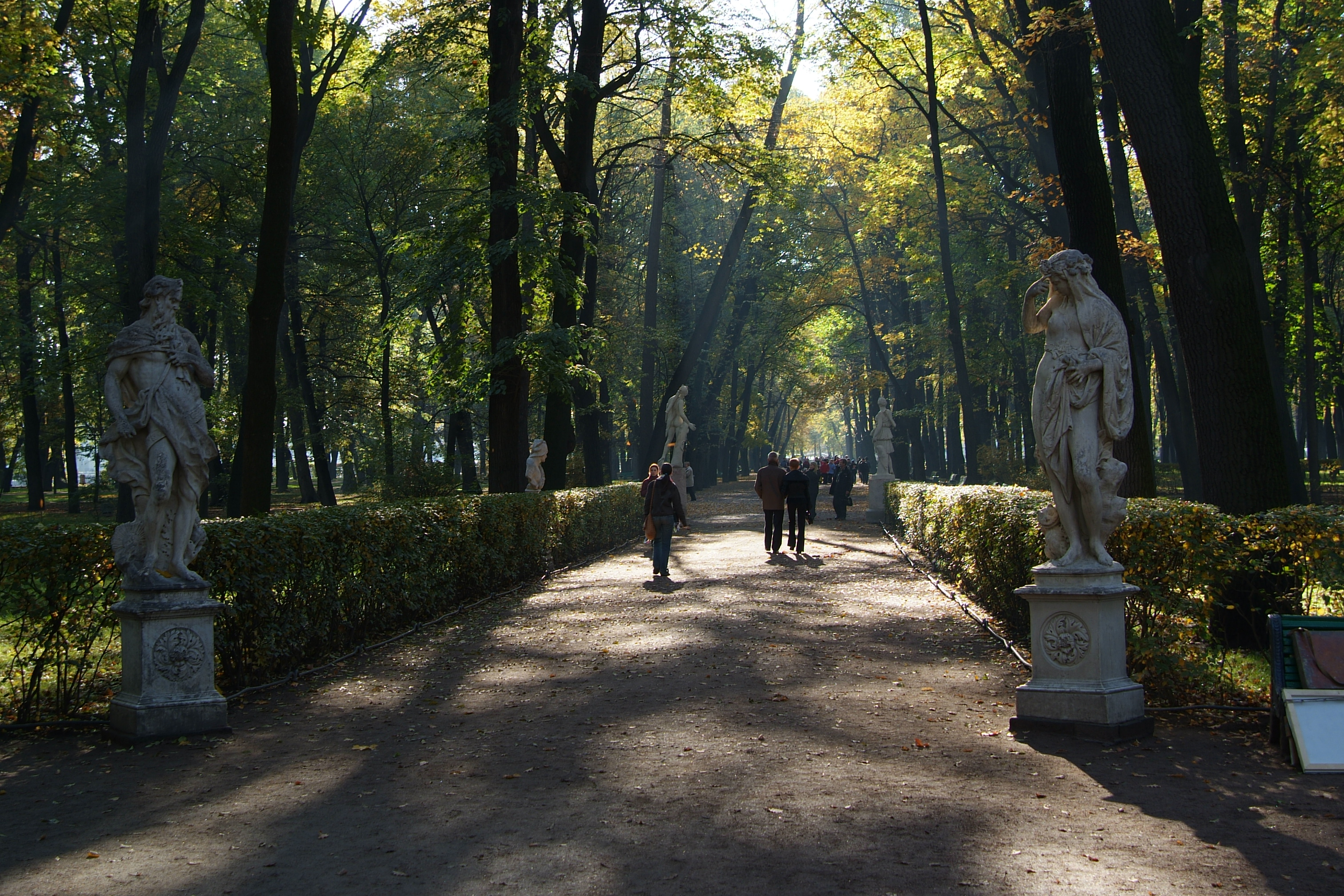 Летний сад. Главная аллея до реконструкции. 2008 г.